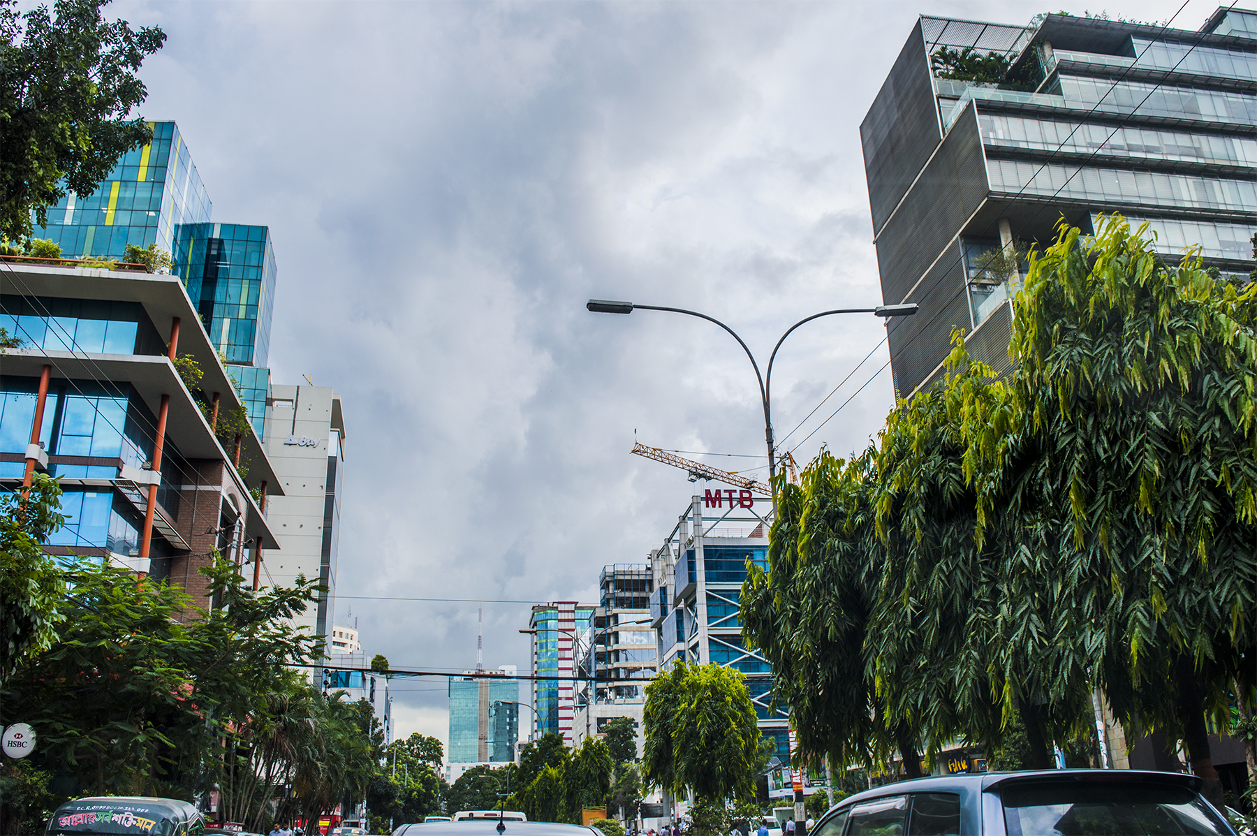 Dhaka